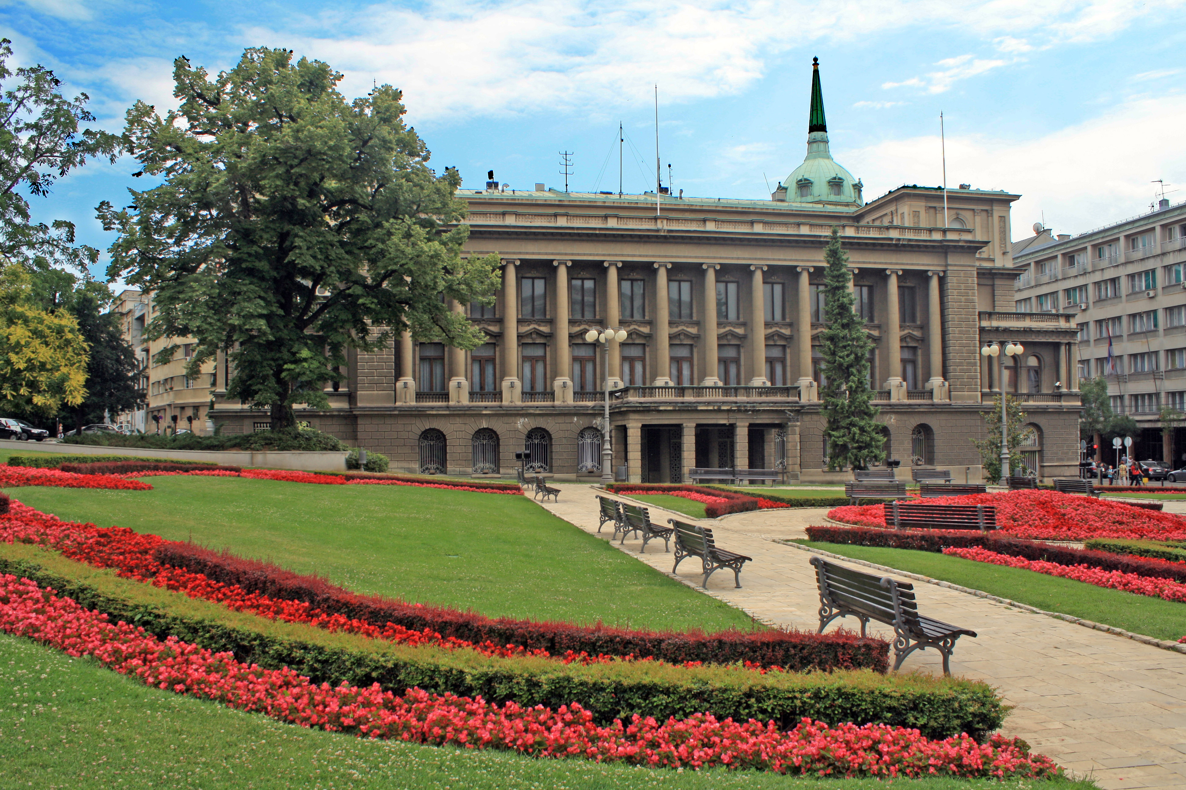 Зграда Новог двора у Београду.